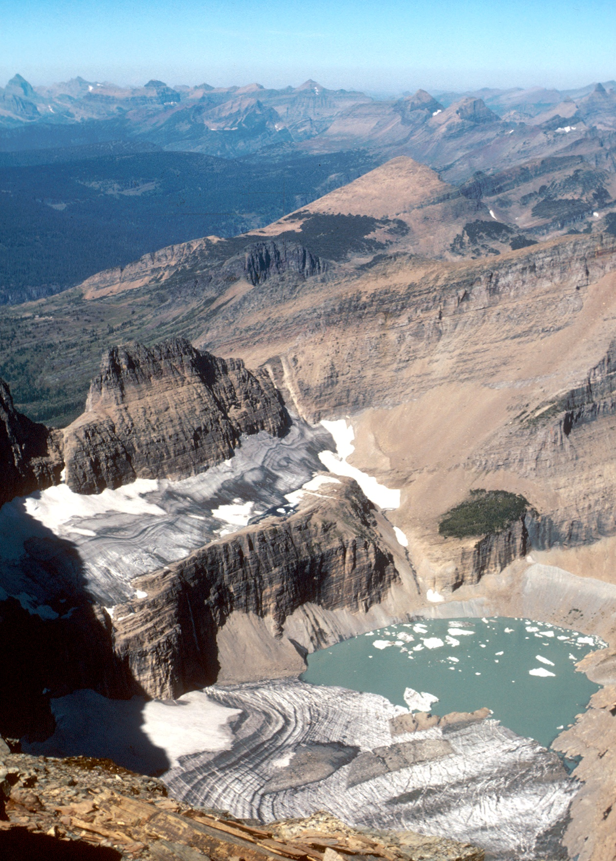 Grinnell Glacier in Glacier National Park (US) in 1981